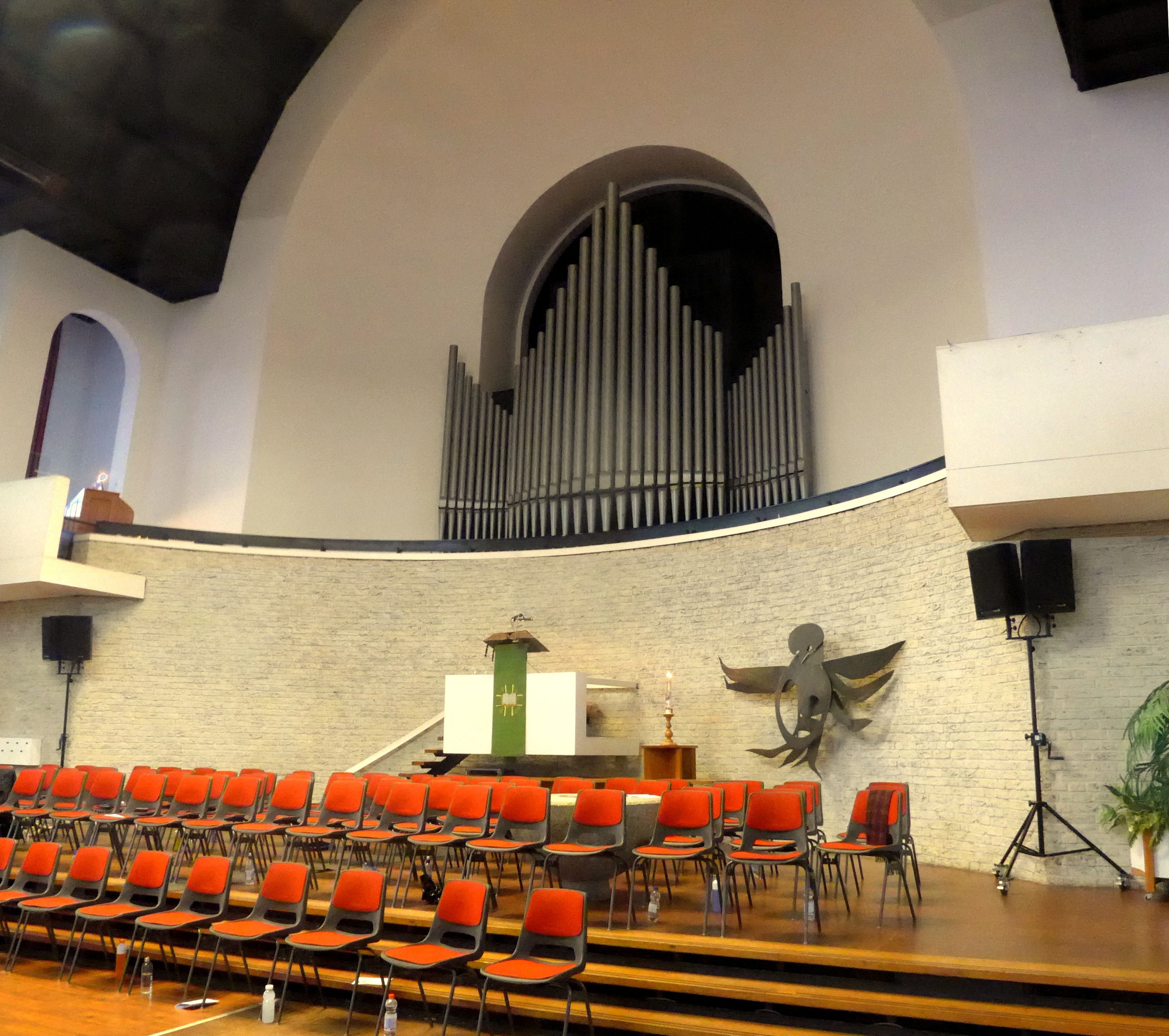 Breepleinkerk, interieur met orgelfont